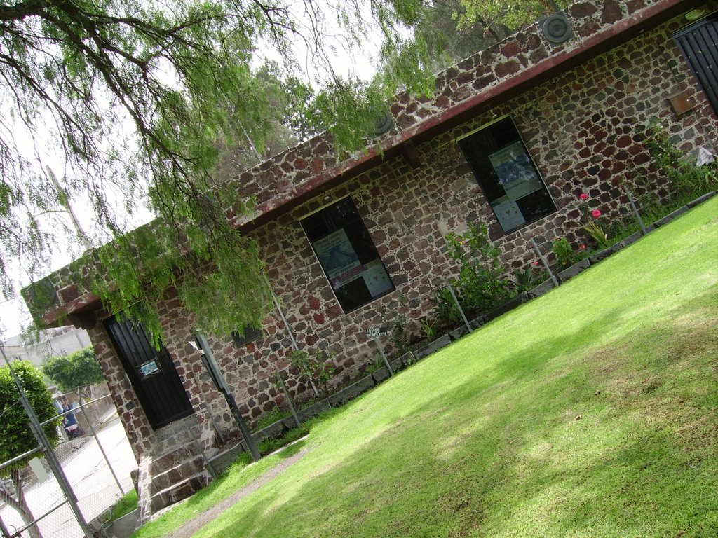 Recinto del museo